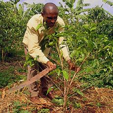 Un planteur de café au Rwanda